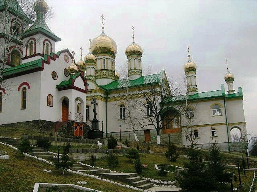 Православний монастир у с. Крива, Тячівського району